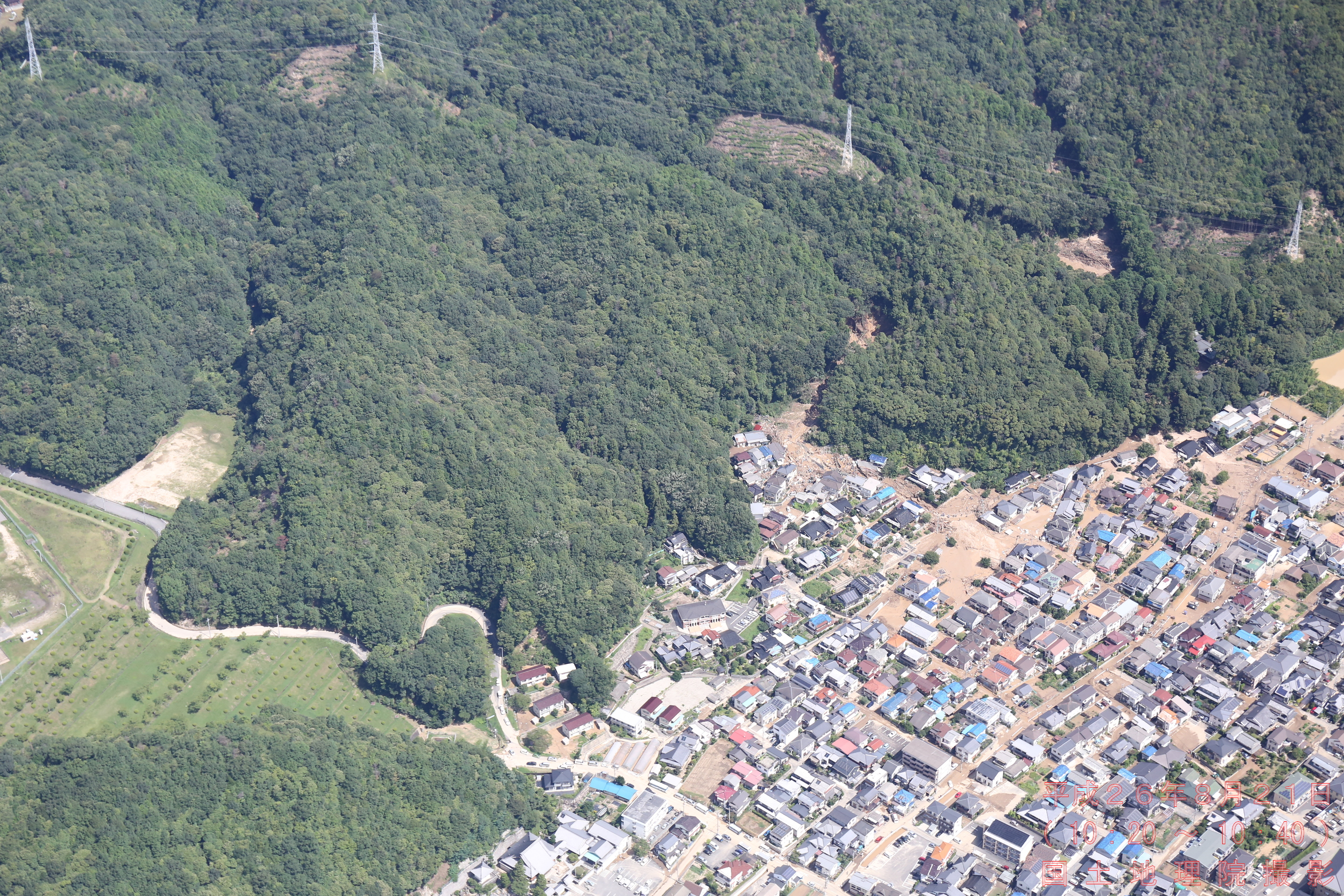 平成26年8月豪雨による広島市の土砂災害